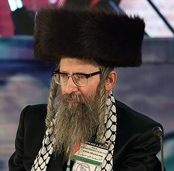 ششمین کنفرانس بین المللی افق نو